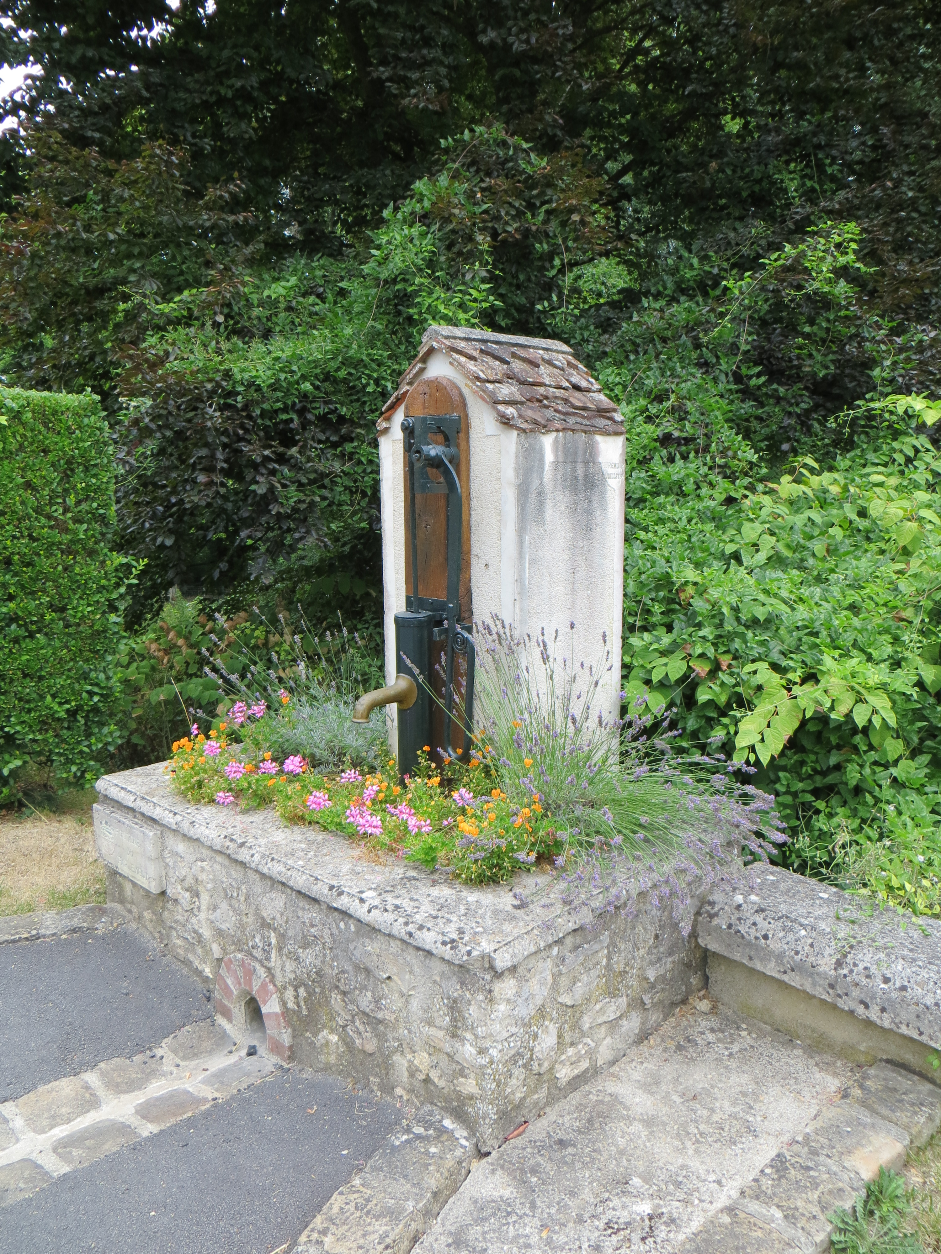 Fontaine publique